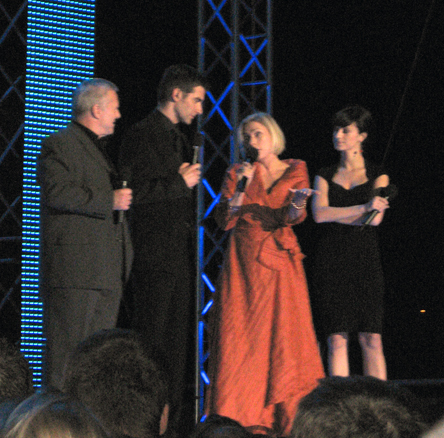 Plebania (serial telewizyjny) - Tomasz Kamel i gwiazdy serialu TV Plebania na inauguracji nowego sezonu (2 września 2007 - koncert przed budynkiem TVP w Warszawie